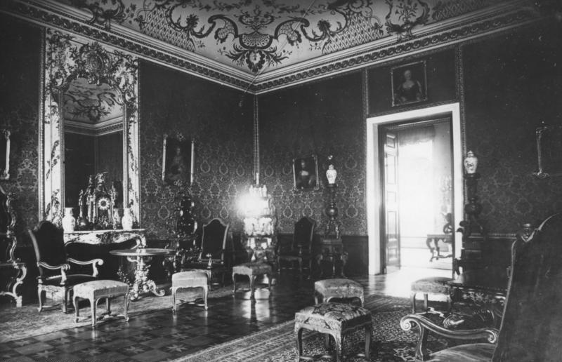 ADN-ZB- Archiv Berlin, Prinz-Albrecht-Palais, Blick in den Staatssalon. 1737-1739 ließ Baron Mathieu Vernezobre de Laurieux das Gebäude errichten. Nach mehrmaligem Funktions- und Eigentümerwechsel ging es 1830 in den Besitz des Prinzen Albrecht über, der es 1830-1832 durch Karl Friedrich Schinkel umbauen ließ. Unter der Leitung von Adolph Lohse wurden 1860-1862 die Innenräume teilweise umgestaltet. Auch nach der Novemberrevolution blieb das Gebäude Eigentum der Hohenzollern. 1928-1931 mietete die Reichsregierung das Palais als Gästehaus, z. B. für die Könige von Afghanistan (1928) und Ägypten (1929). Seit 1934 nutzte die SS das Gebäude, u. a. auch als Dienstsitz des Chefs des Sicherheitsdienstes der SS (seit September 1939). Während des zweiten Weltkrieges wurde das Gebäude stark beschädigt, seine Überreste 1949 abgerissen. Aufnahme: 1928 5253-28 [Scherl Bilderdienst]